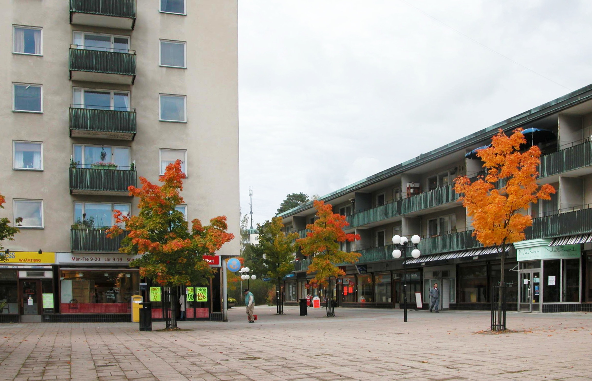 Källängstorget i stadsdelen Näset på Lidingö en höstdag 2003.